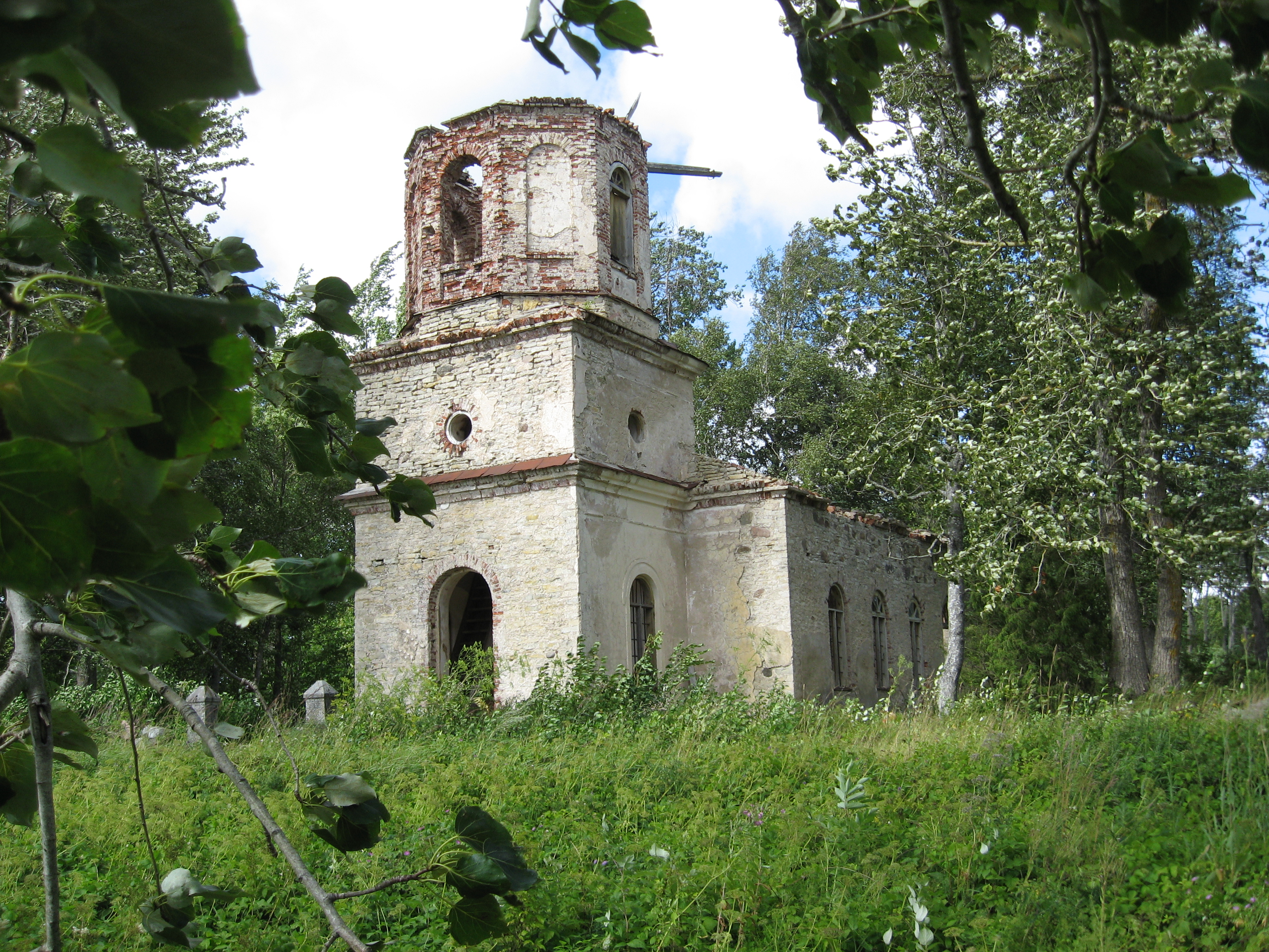 Kalli õigeusu kiriku varemed